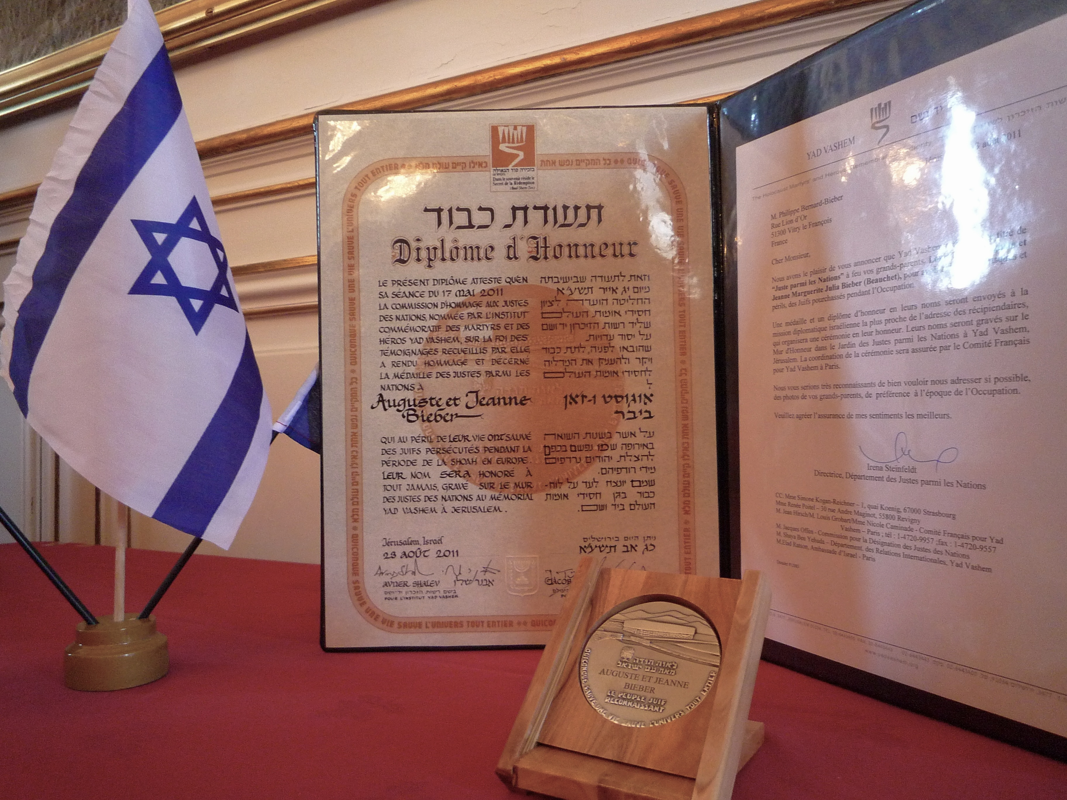 Strasbourg 22 juillet 2012 Remise diplome Yad Vashem Auguste et Jeanne Bieber